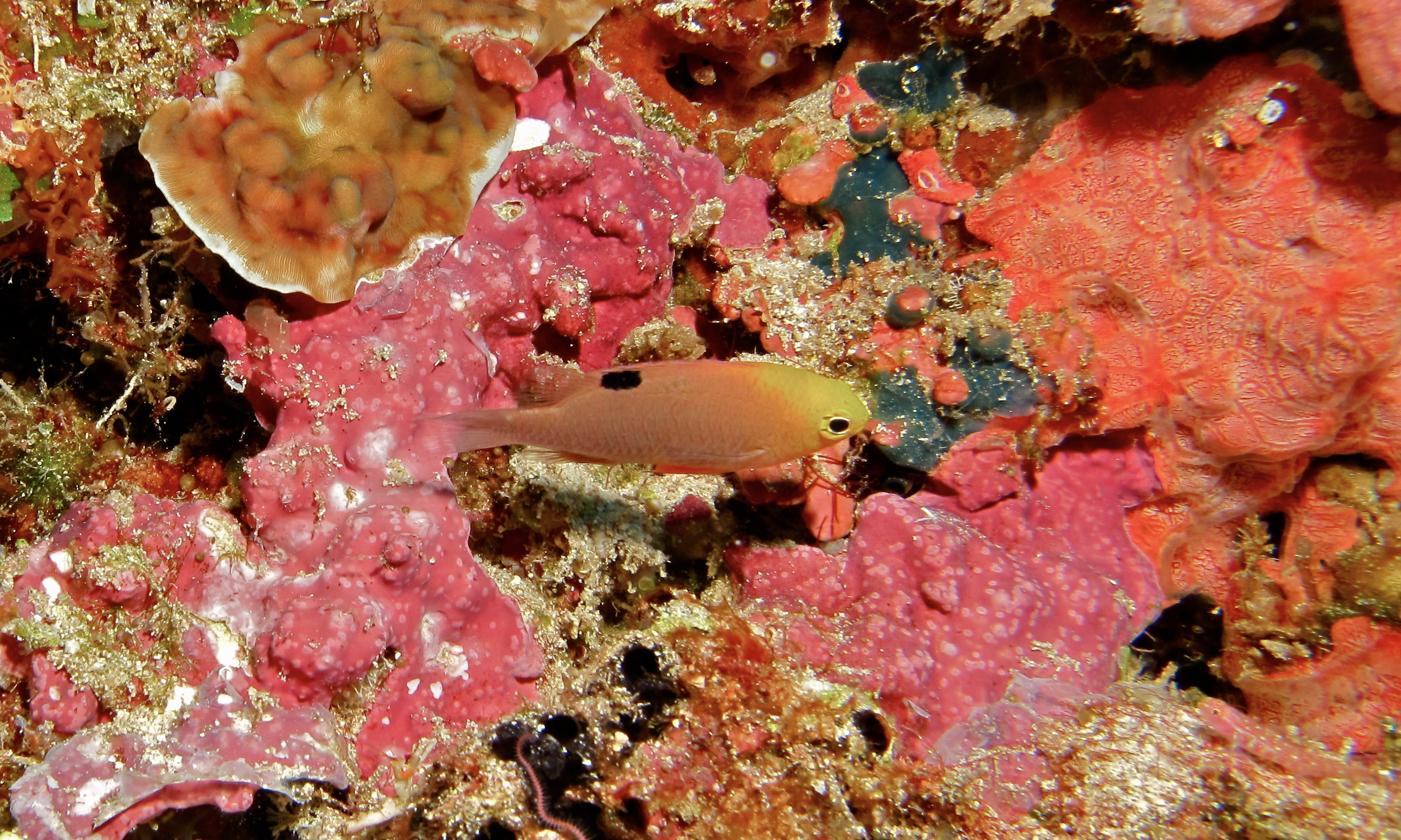 Likuan I, Bunaken Island, Sulawesi, INDONESIA